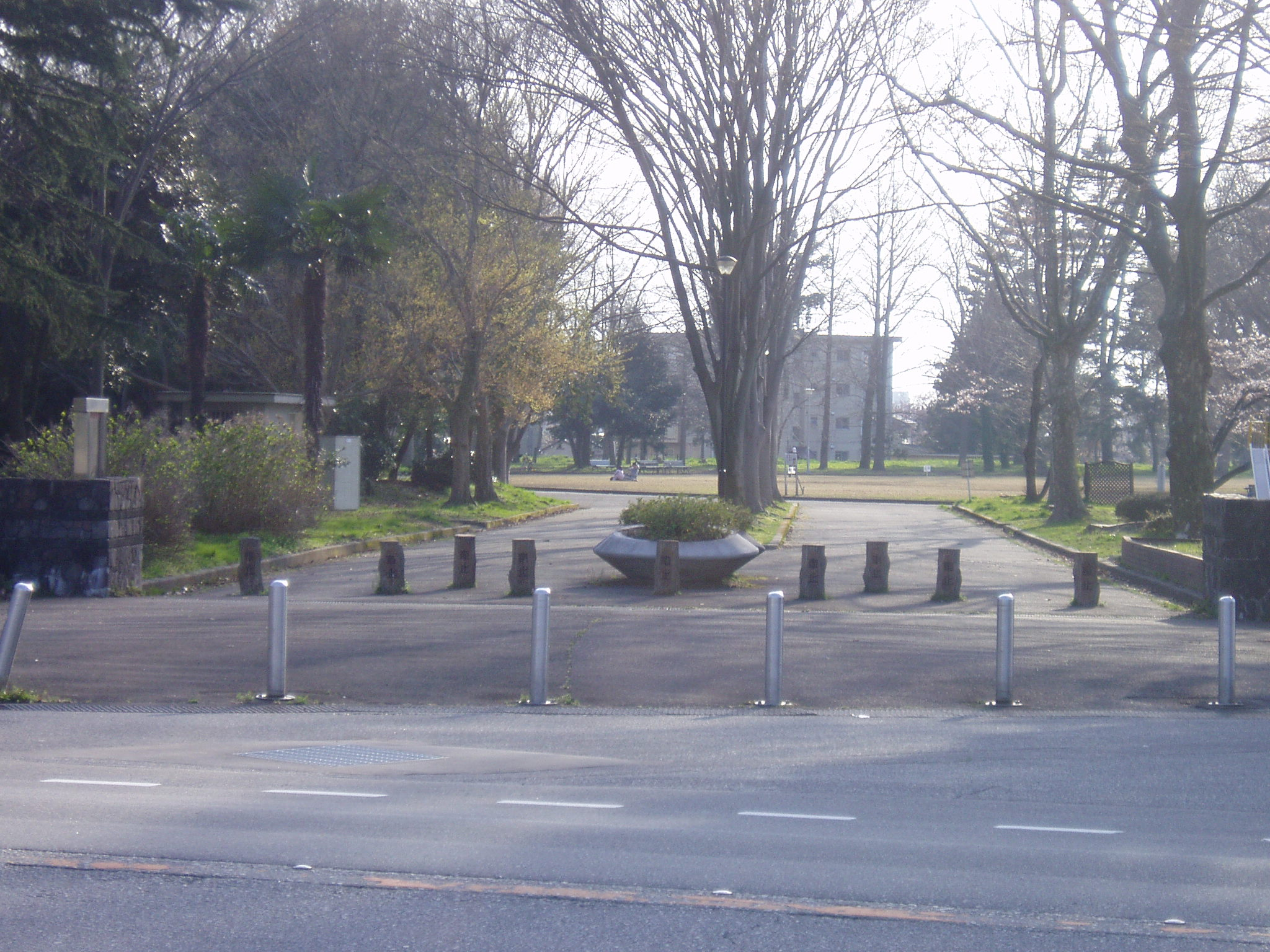 馬場記念公園の入り口